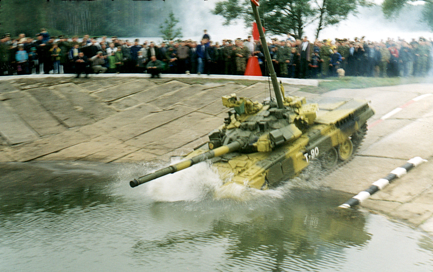 T-90 snorkel test